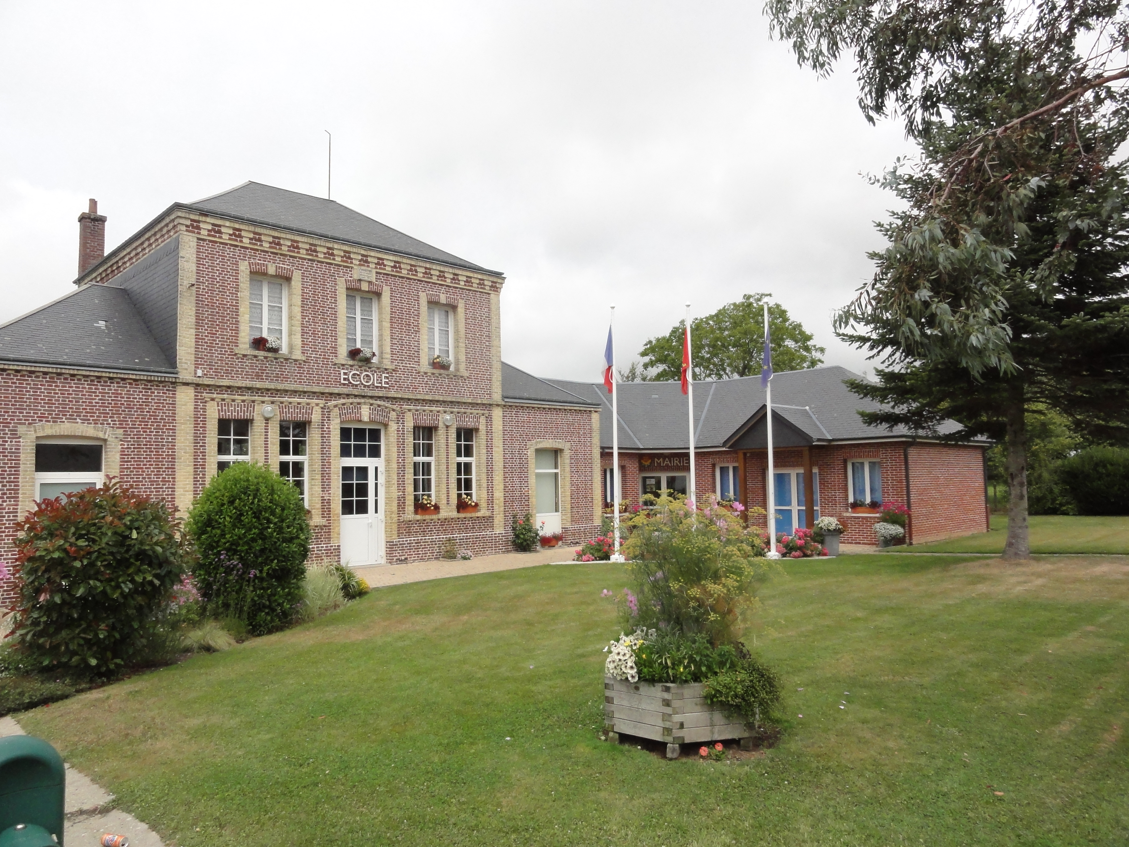 Villainville (Seine-Mar.) école et ancienne mairie